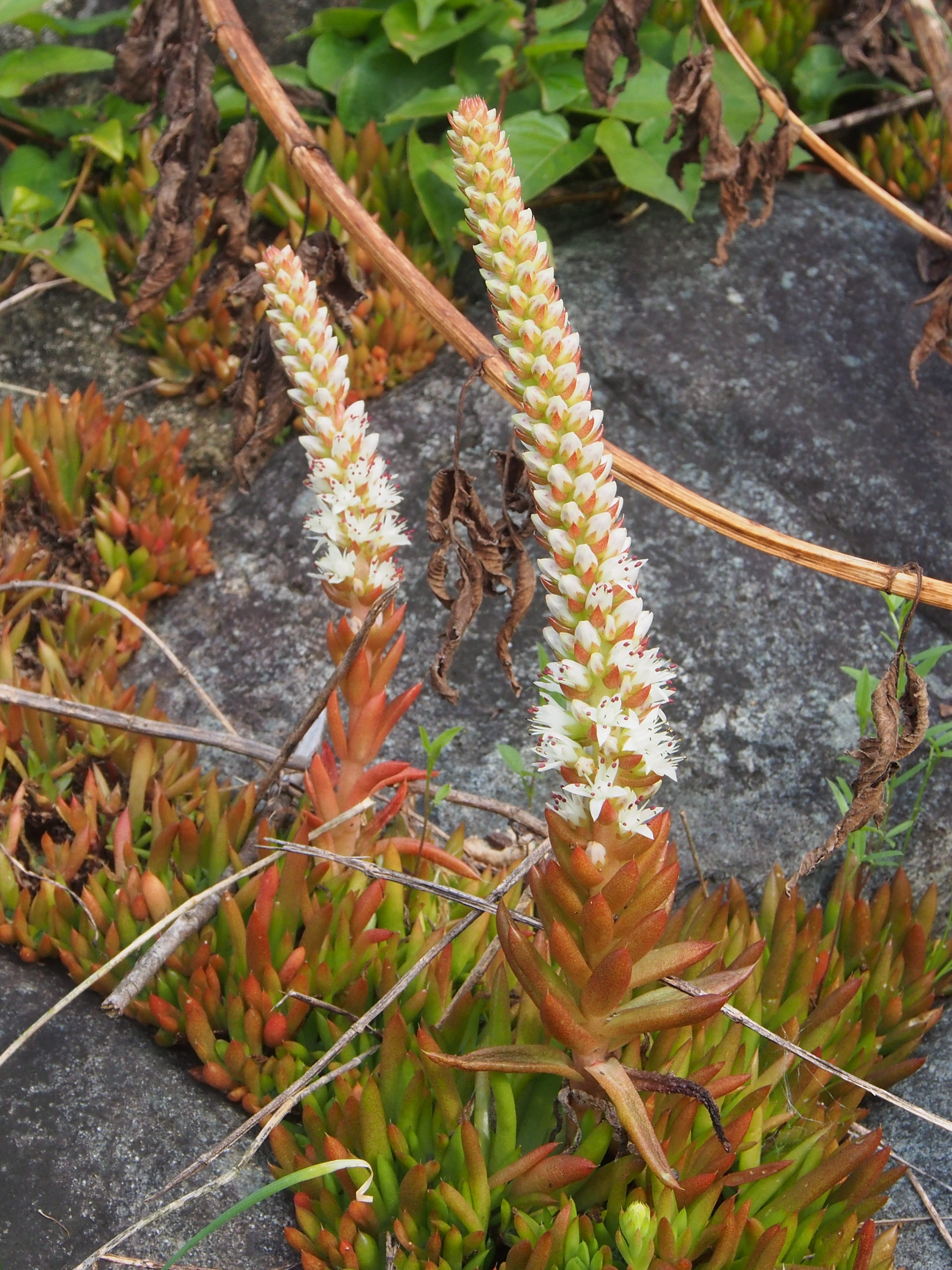 ツメレンゲ花